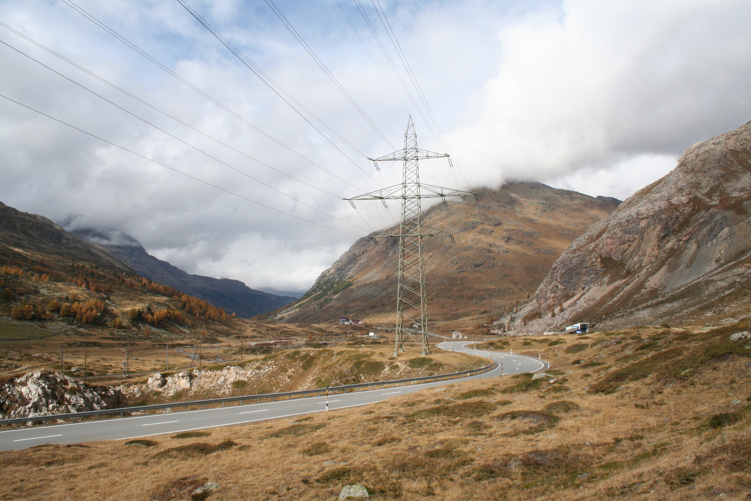 Val Bernina Richtung Norden. Links die Talstation der Diavolezzabahn, rechts der Bahn zum Piz Lagalb. Darüber der wolkenverhangene Piz Albris.